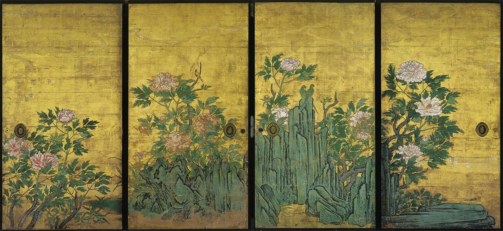 Pivoine sur paravent du peintre Kanō Sanraku (17e siècle). Couleur or sur papier 184x93,5.